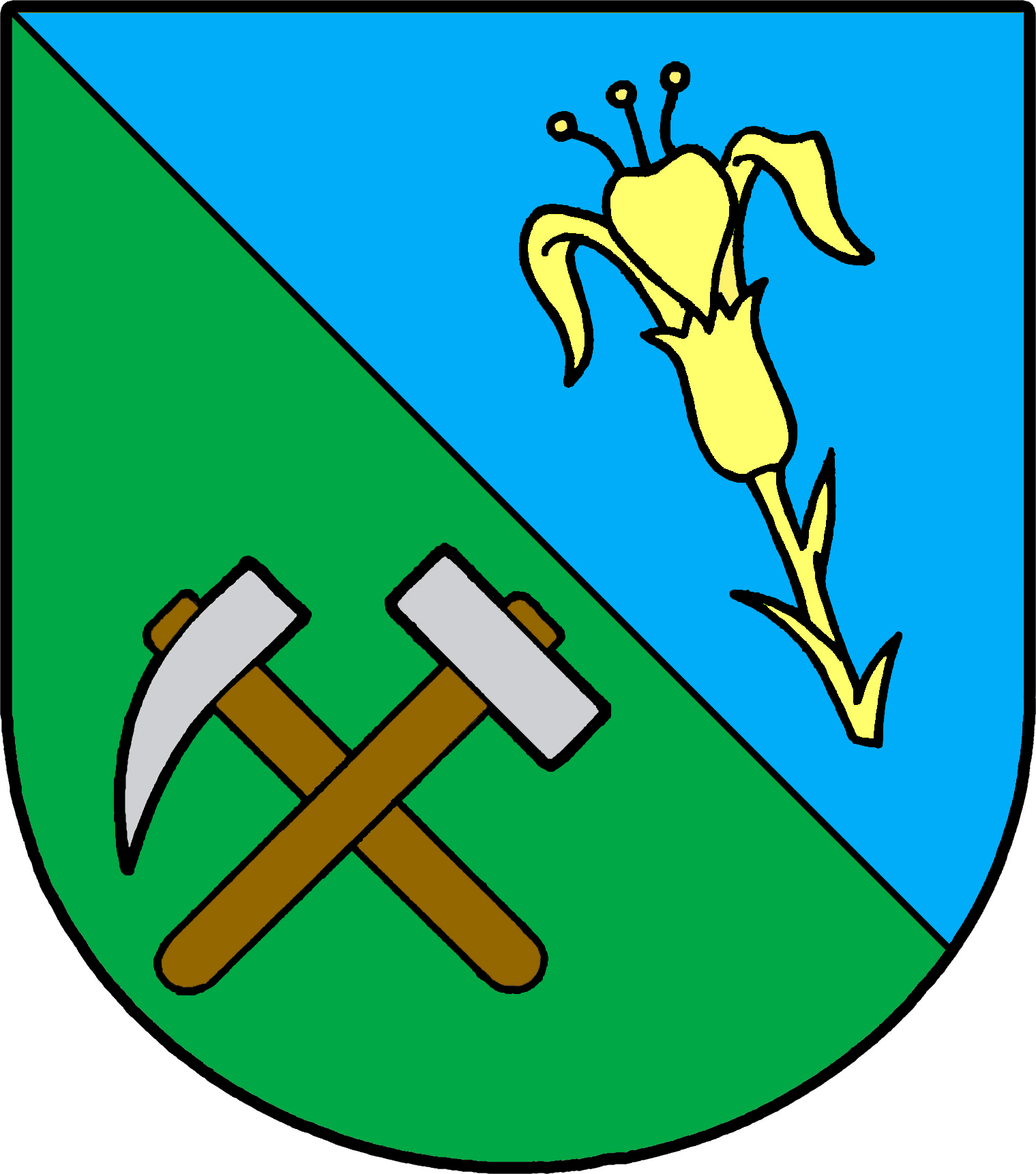 Česky: znak obce Ražice